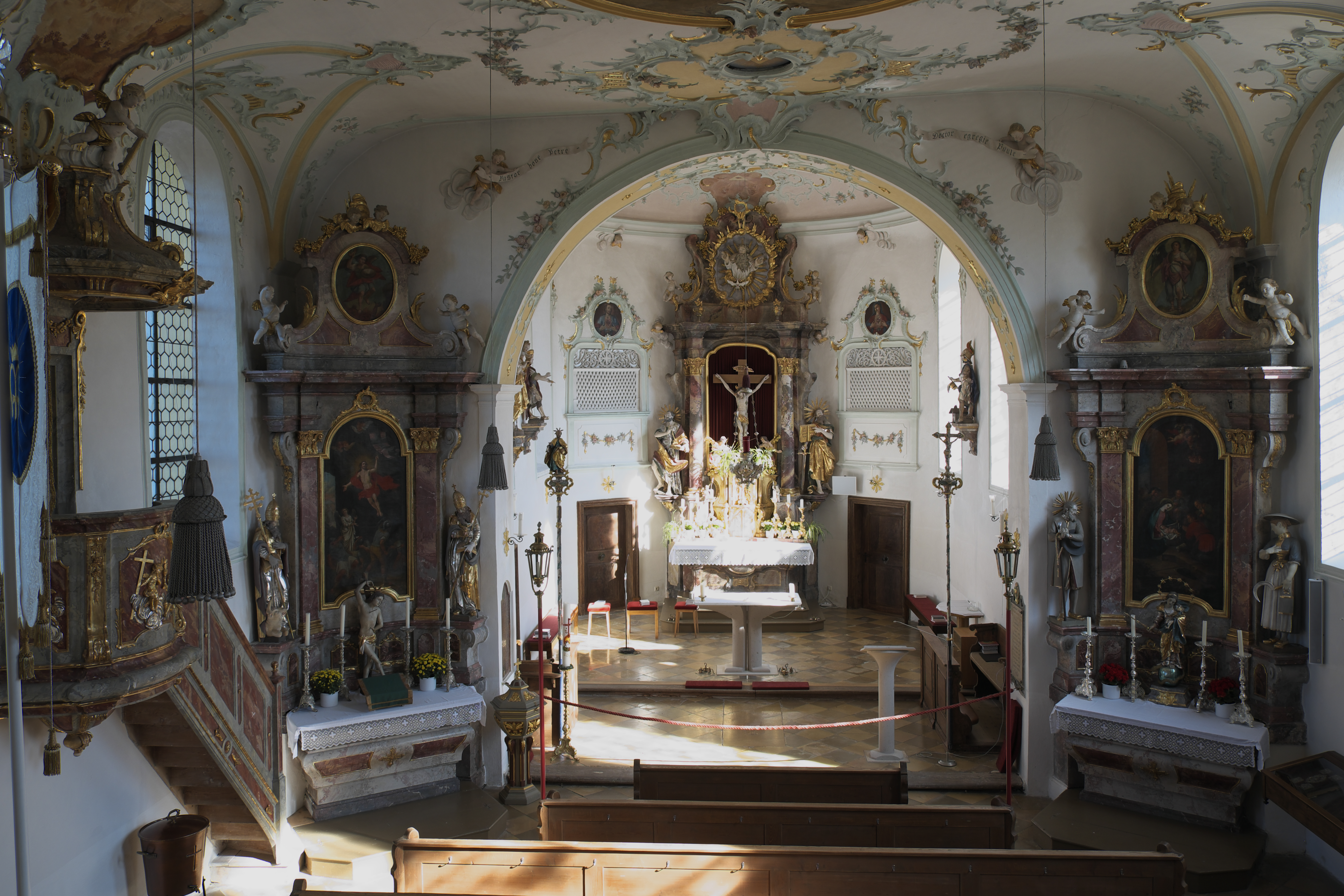 Katholische Pfarrkirche St. Petrus und Paulus in Petzenhausen, einem Ortsteil von Weil (Oberbayern) im Landkreis Landsberg am Lech (Bayern/Deutschland), Innenraum